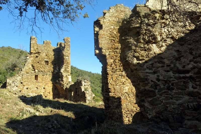 Castell de Vila-Romà a Palamós (Baix Empordà) - Catalunya